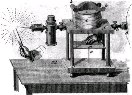 Blowpipe - circa 1827